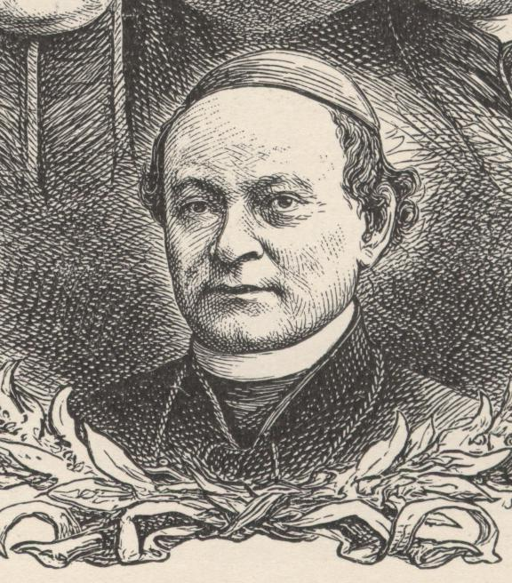 Bischof Matthias Eberhard, Trier